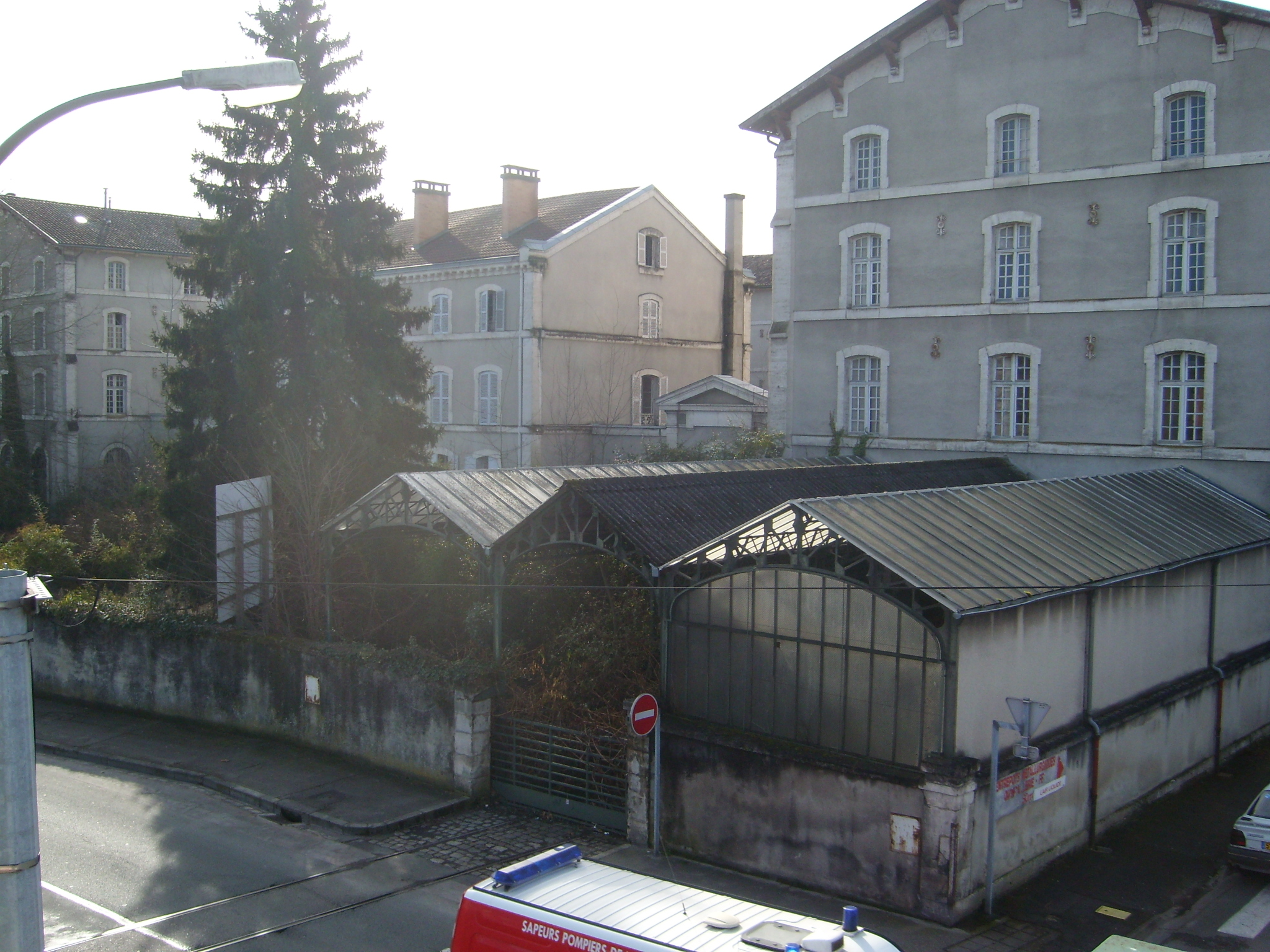 La Seita abandonnée, à Périgueux (Dordogne, France).